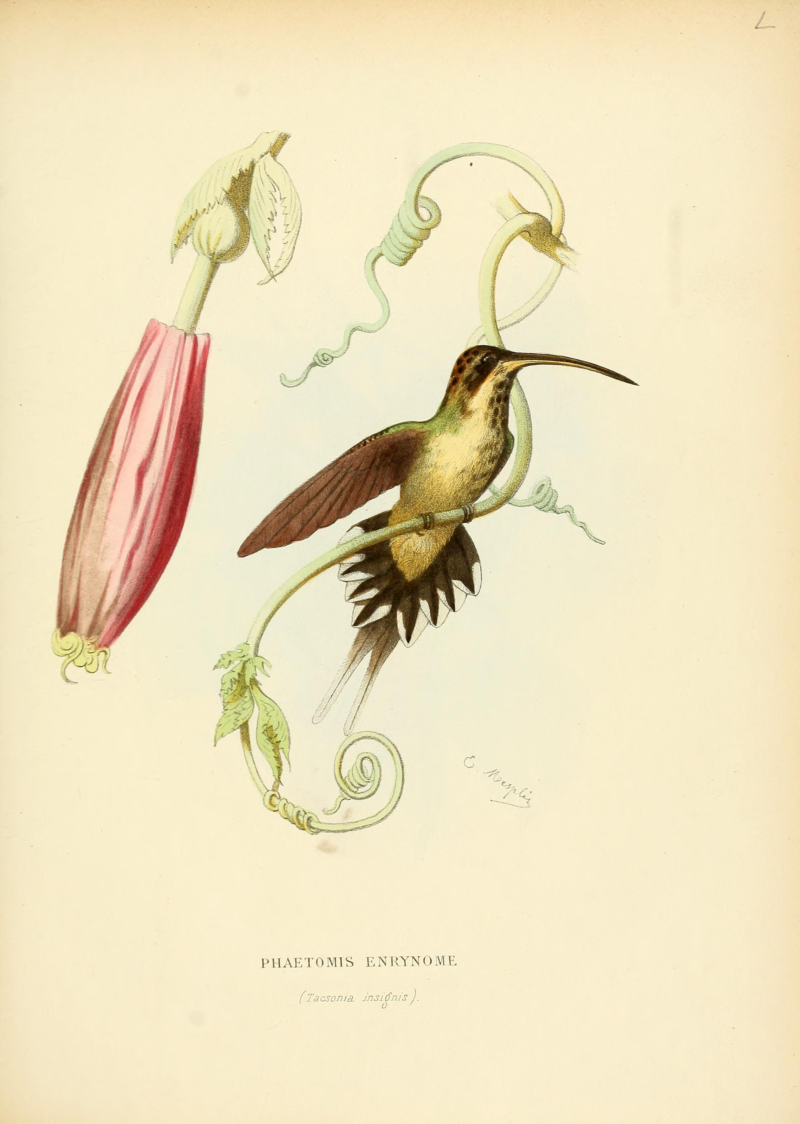 Phaethomis eurynome = Phaethornis eurynome